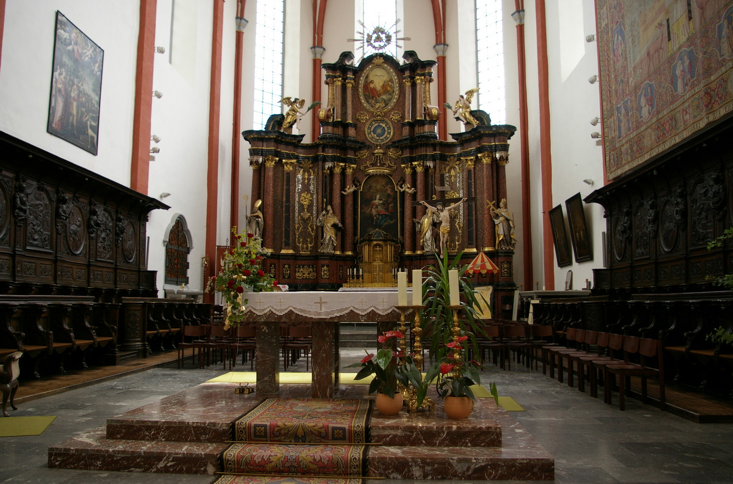 Basilique de Prüm : maître-autel